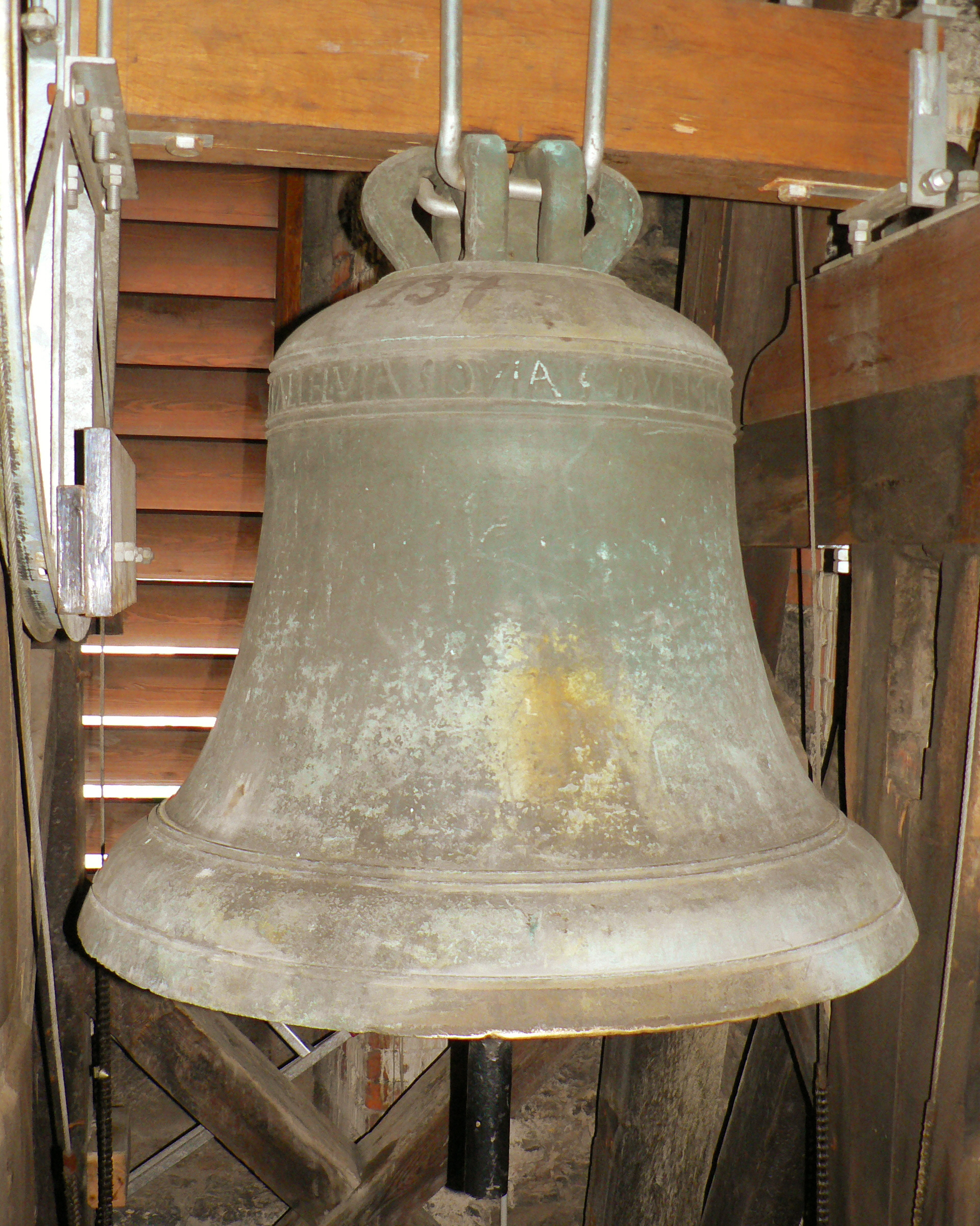 St. Marien Hof, Josefsglocke